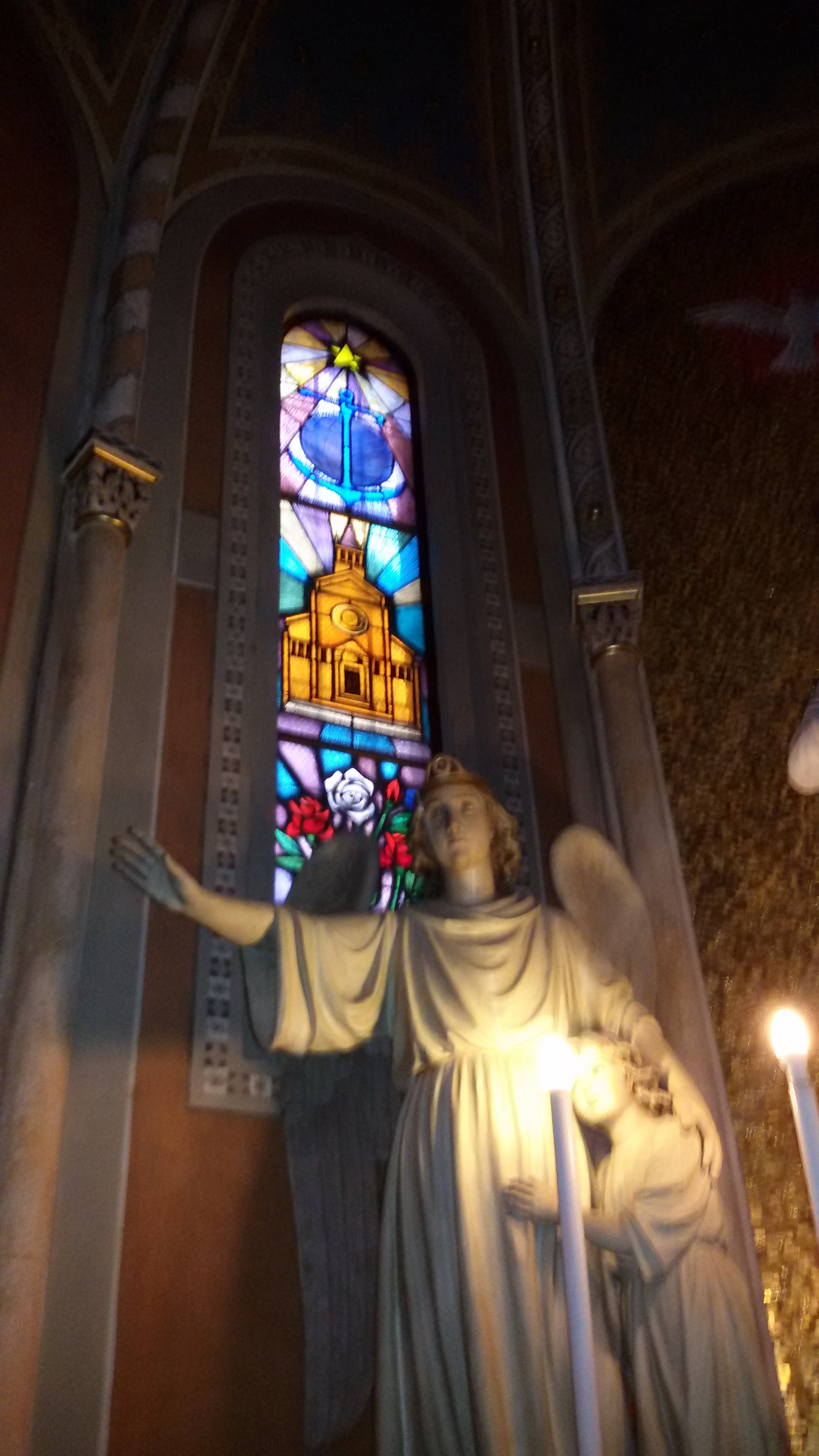 Chiesa di Santa Cristina Quinto di Treviso